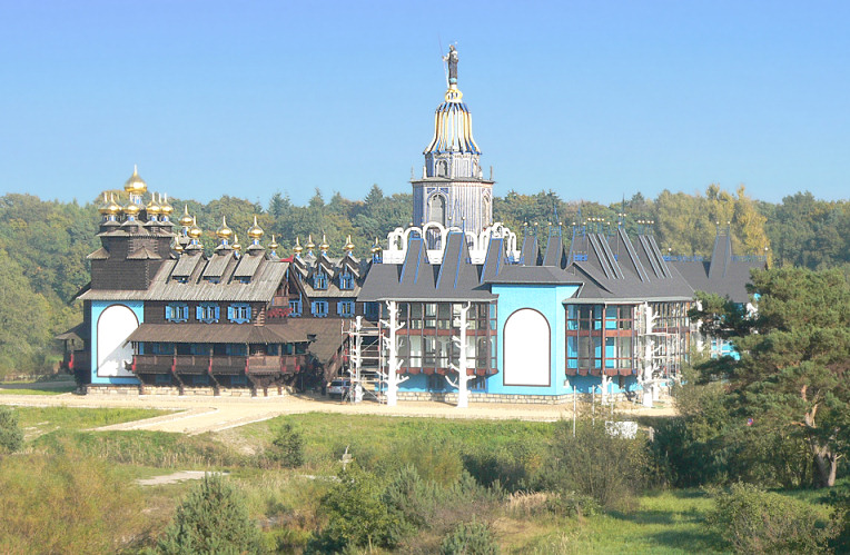 Gebäude des Kulturinstituts Die Brücke in Gifhorn